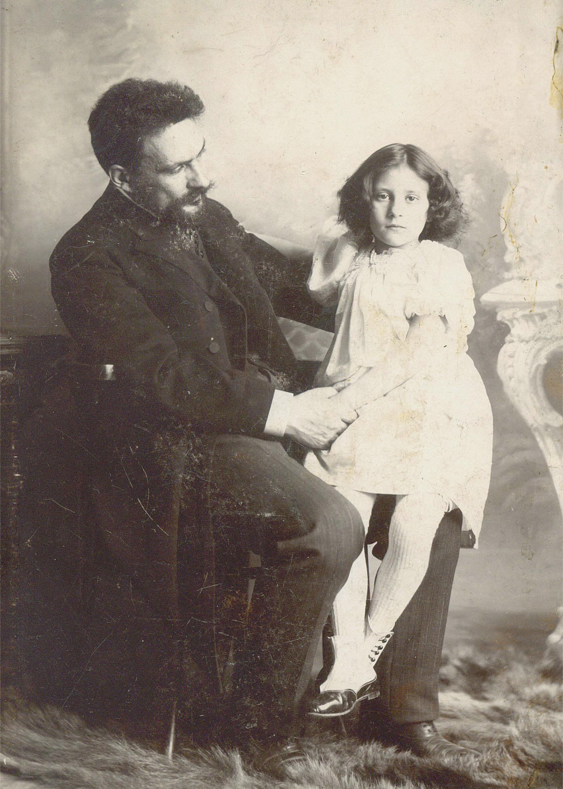 Николай Яковлевич Ляхницкий (1871—?) — присяжный поверенный, член Государственной думы III созыва от Ставропольской губернии и его дочь Надежда.